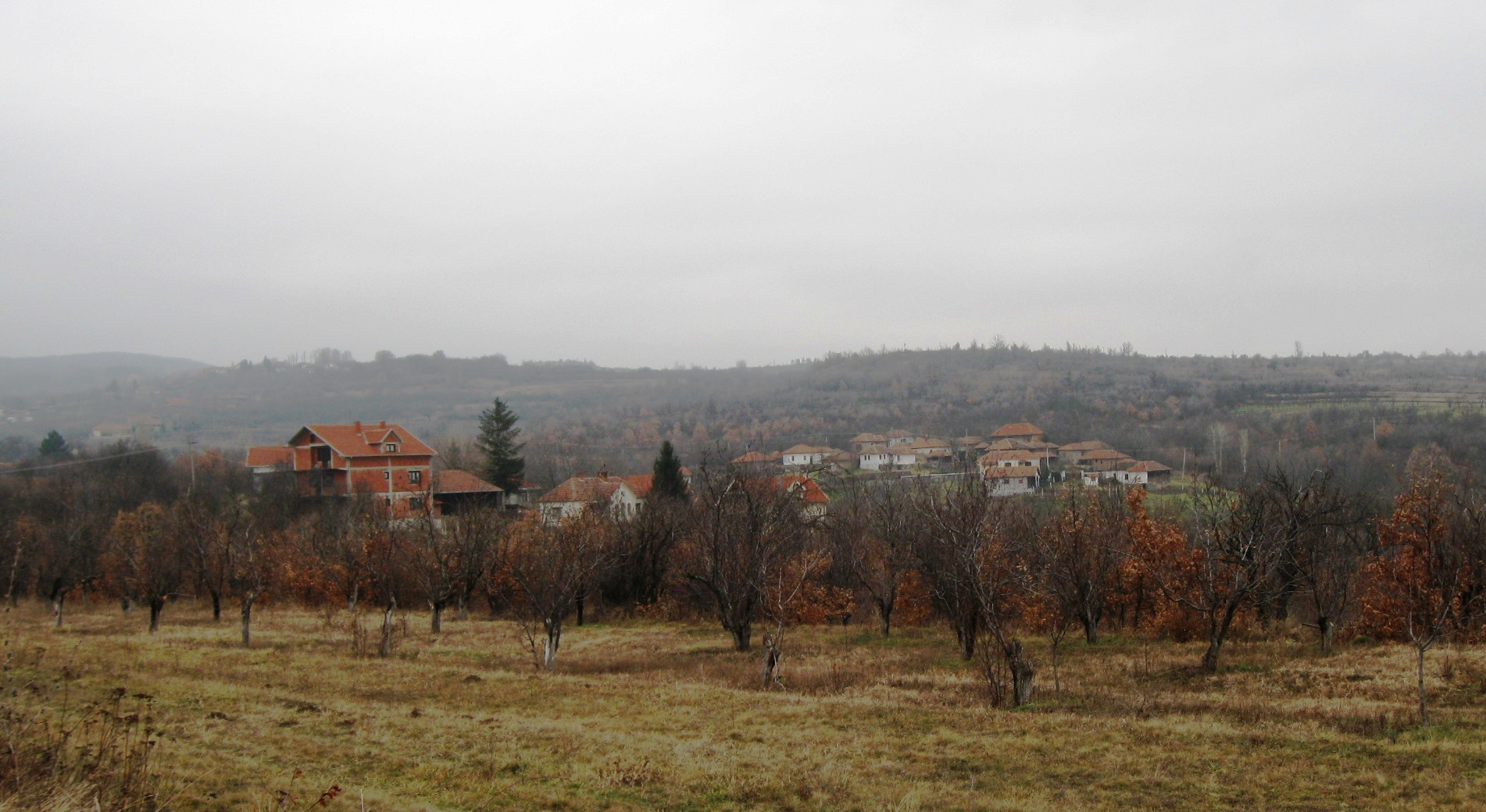 Ivanje, Bojnik